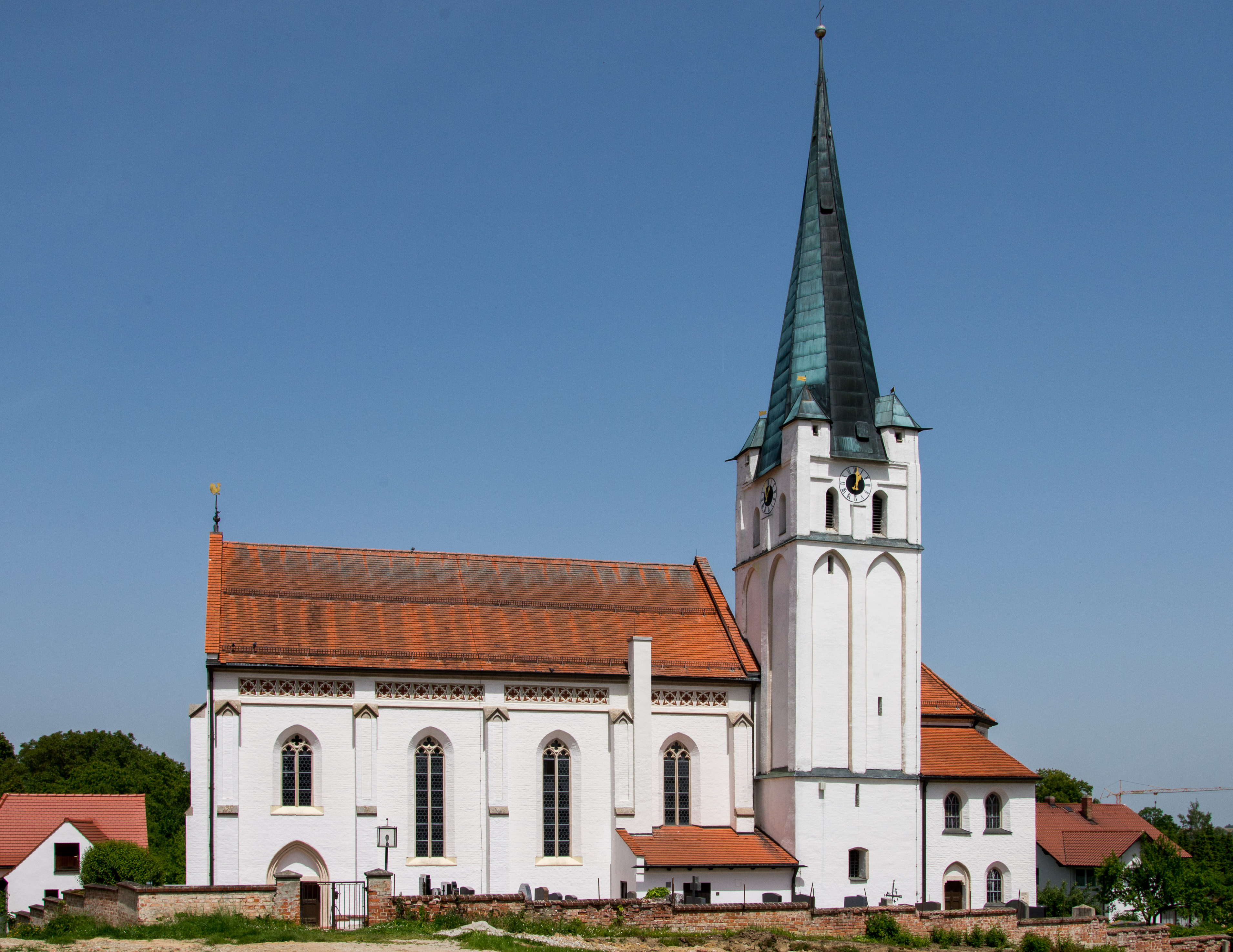 Katholische Kirche St. Georg: Saalkirche, neugotischer Bau mit eingezogenem Chor und Chorflankenturm mit Spitzhelm, Gliederung durch Strebepfeiler und umlaufenden Dachfries, 1877, Turm Mitte 15. Jahrhundert; mit Ausstattung. This is a photograph of an architectural monument.